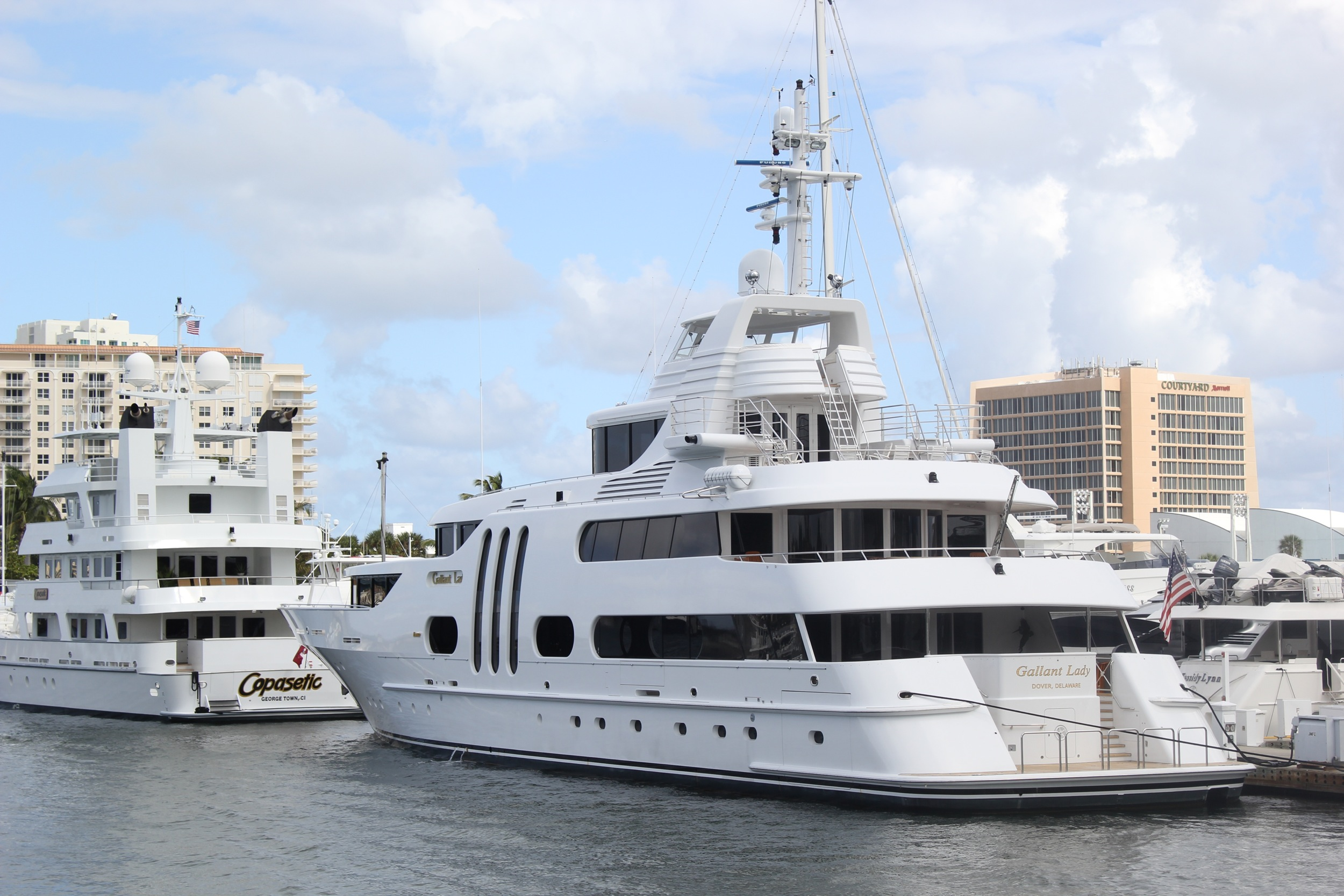 Dover, Delaware